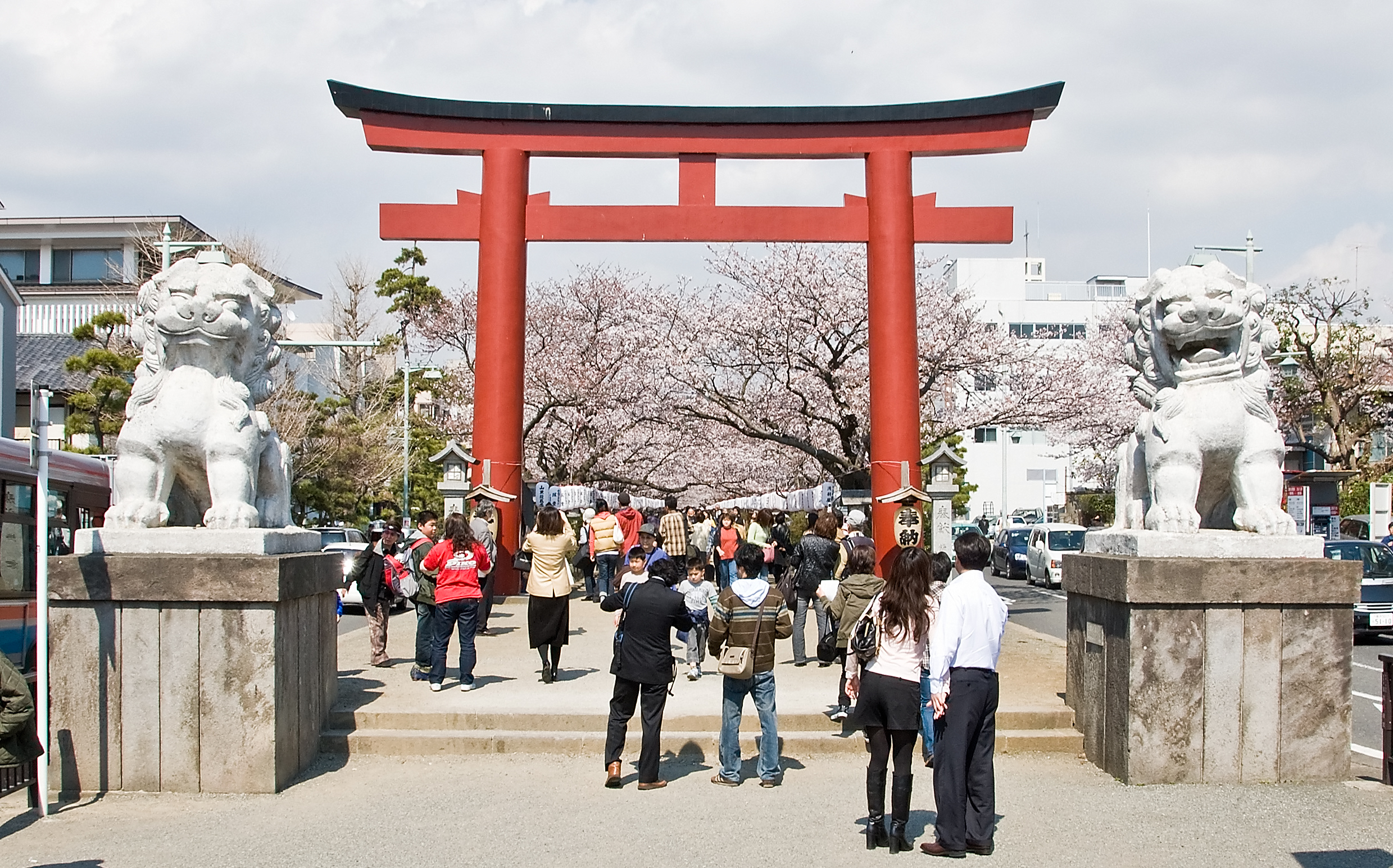 Komainu pair